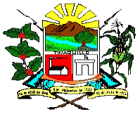 Escudo del municipio Falcón, estado Cojedes, Venezuela